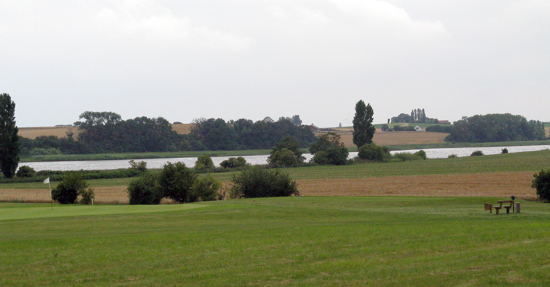 Stege Nor på Møn, set fra Keldby Kirke.